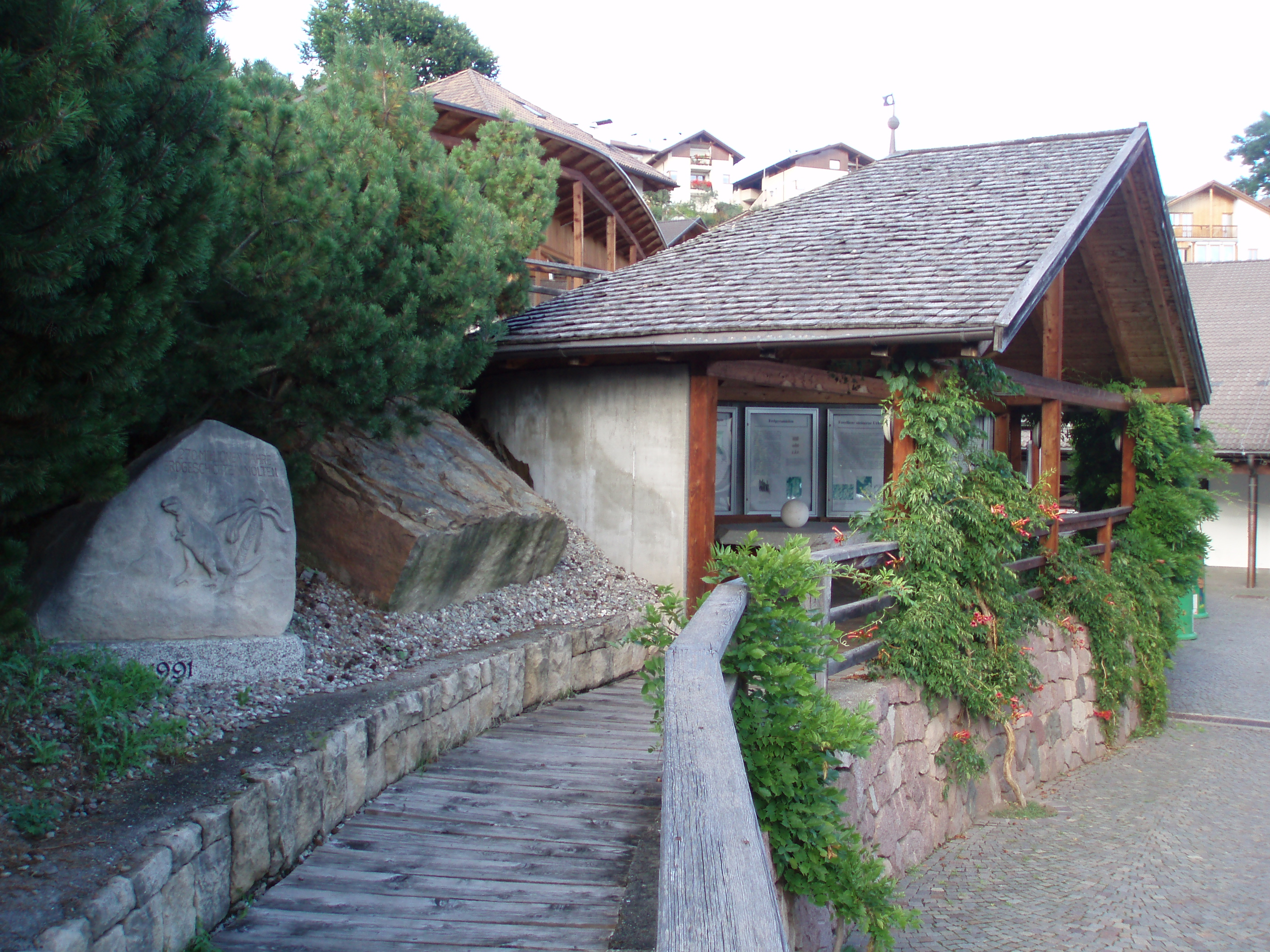 Fossilienmuseum in Mölten